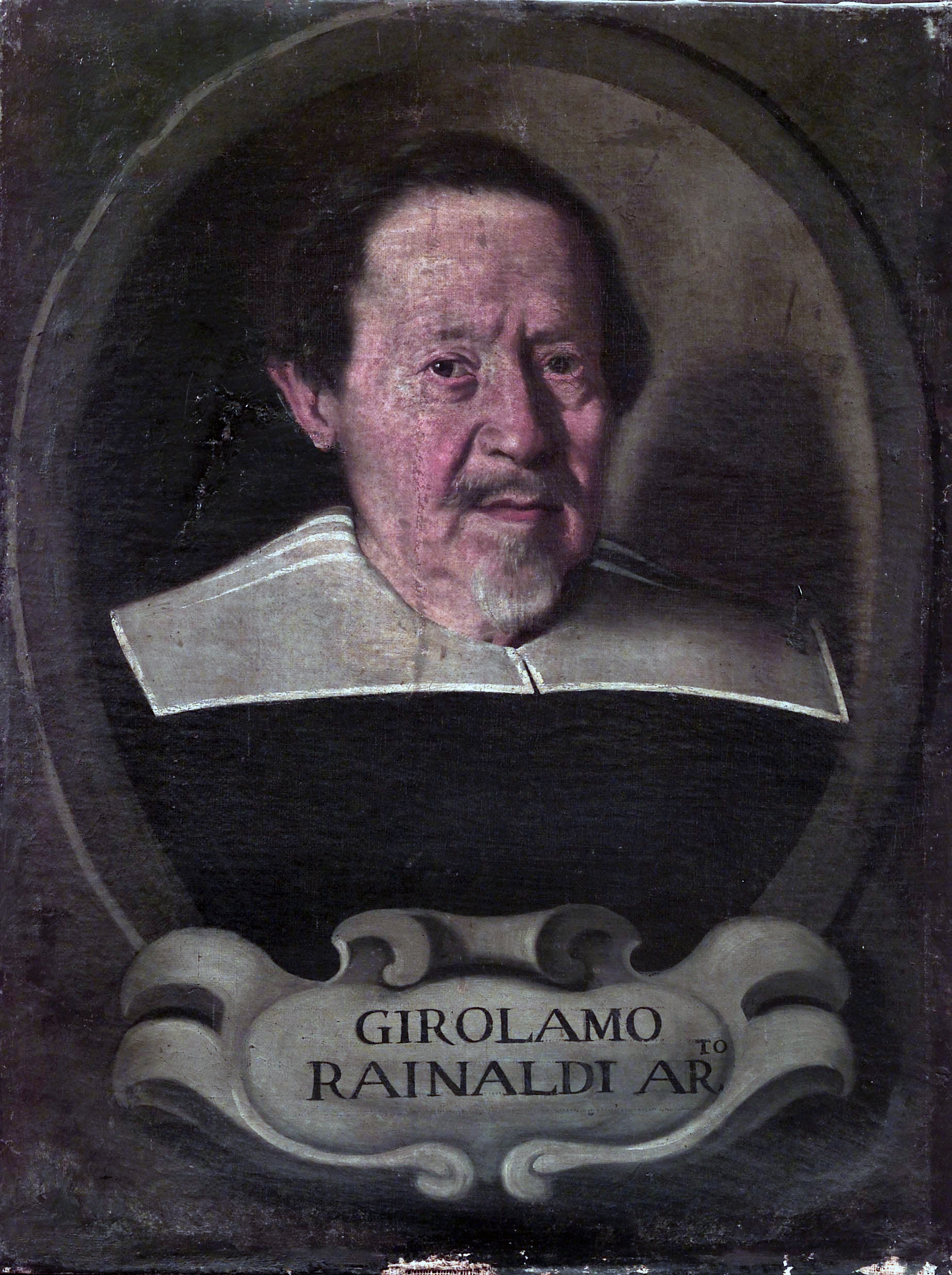 Girolamo Rainaldi, ritratto